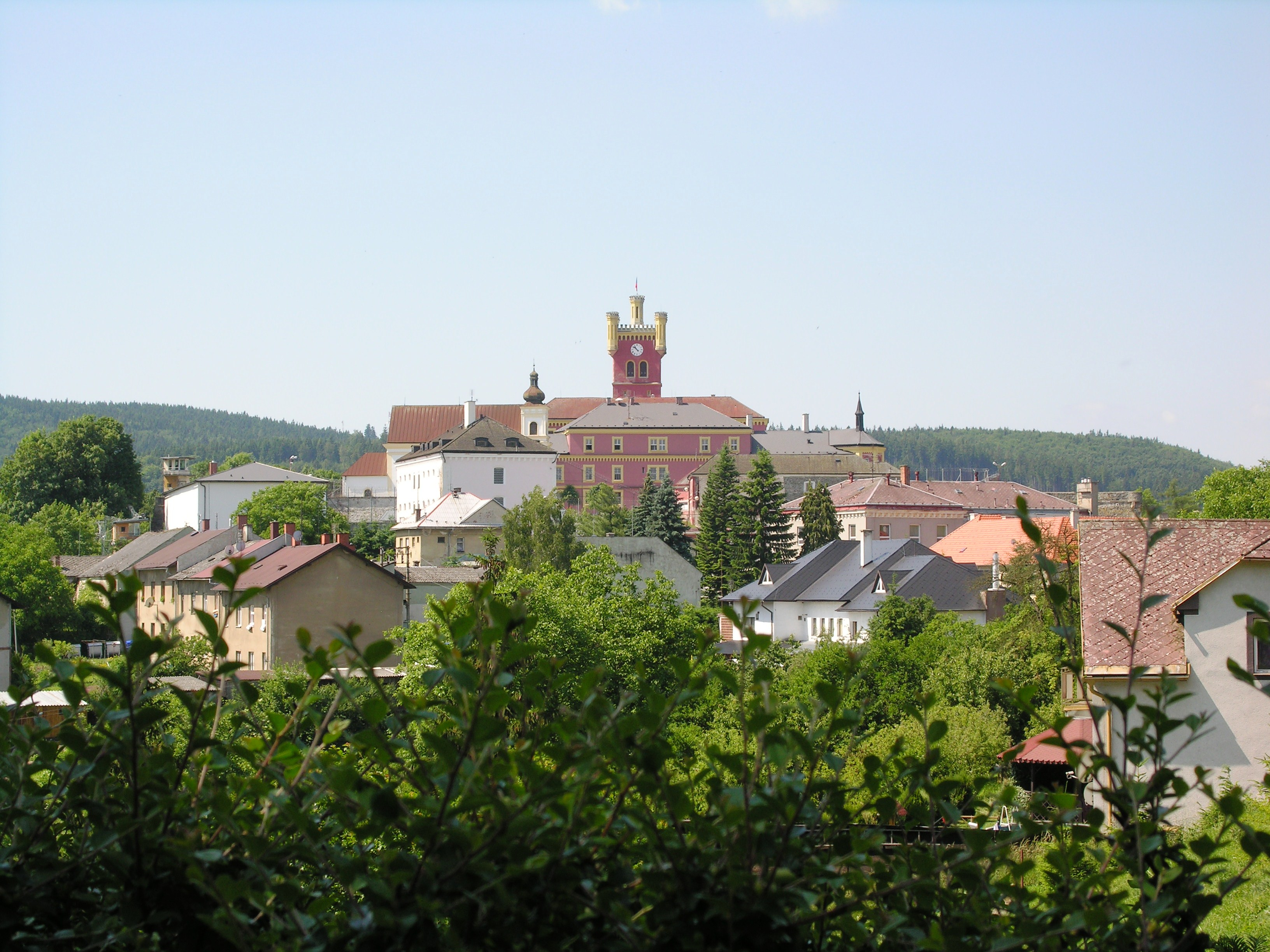 Hrad Mírov s kostelem sv. Máří Magdalény (Mírov)